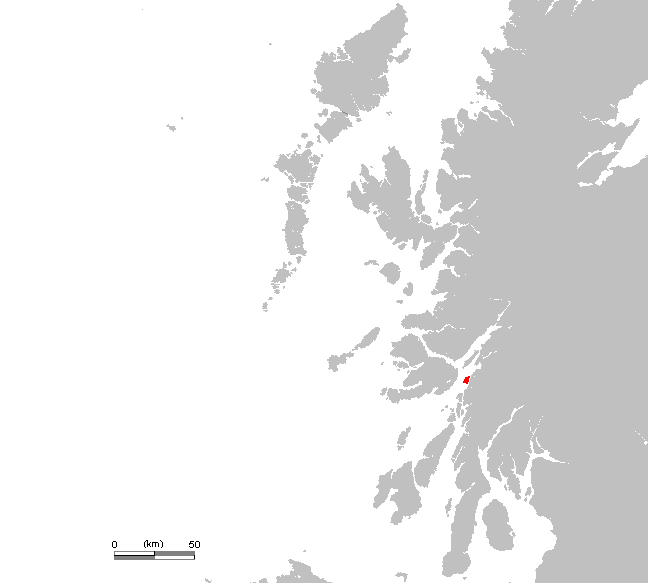 UK Kerrera.PNG (Scotland, Hebrides)